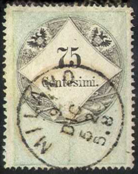 Гербово-почтовая марка Ломбардо-Венецианского королевства